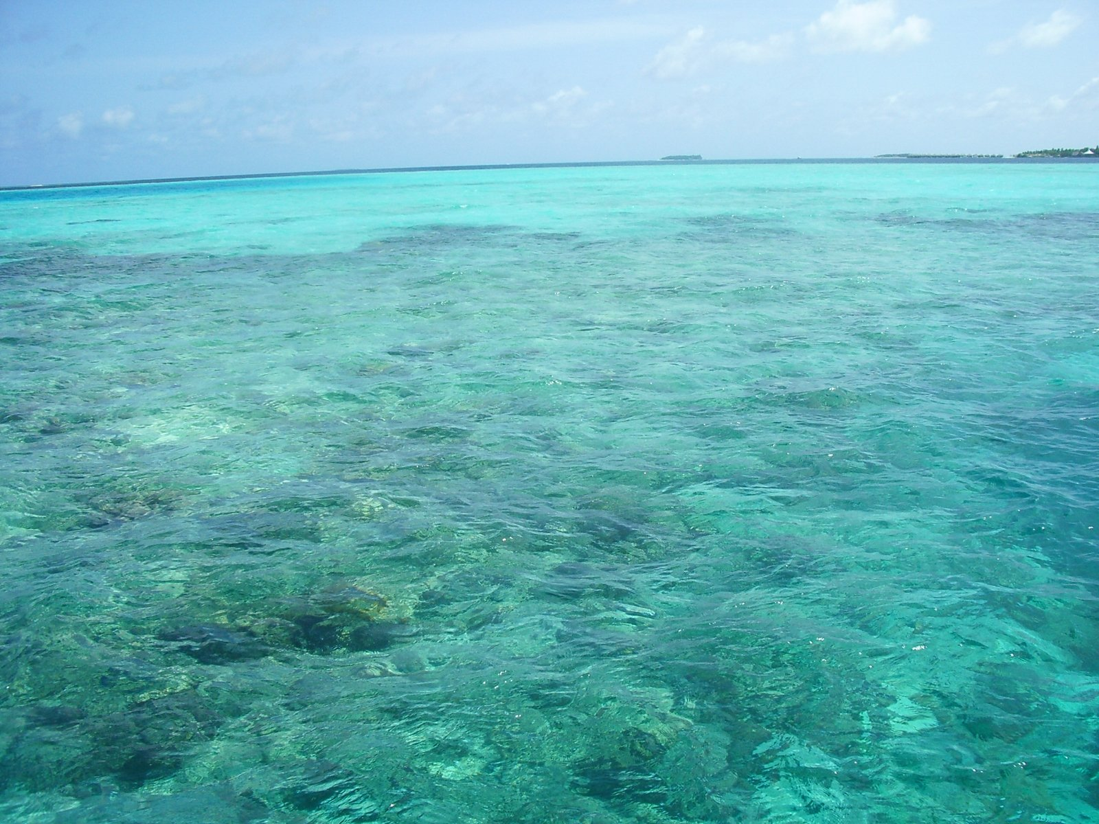 Reefs, Maldive Islands; foto feta per J. Ollé el juliol del 2006